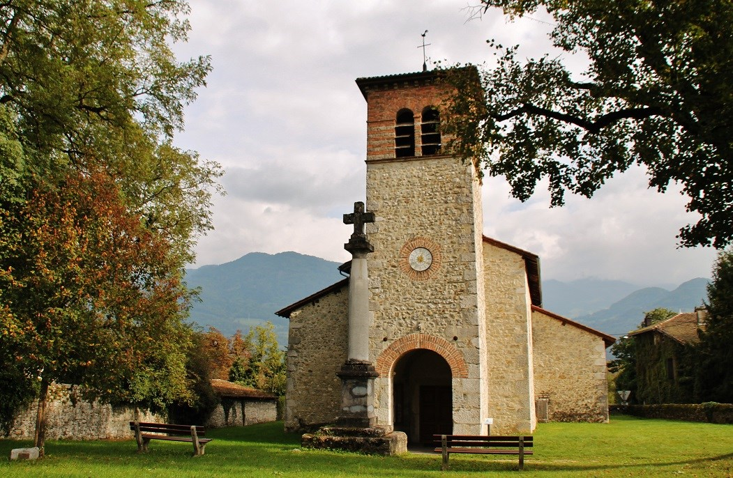 église St Aupre